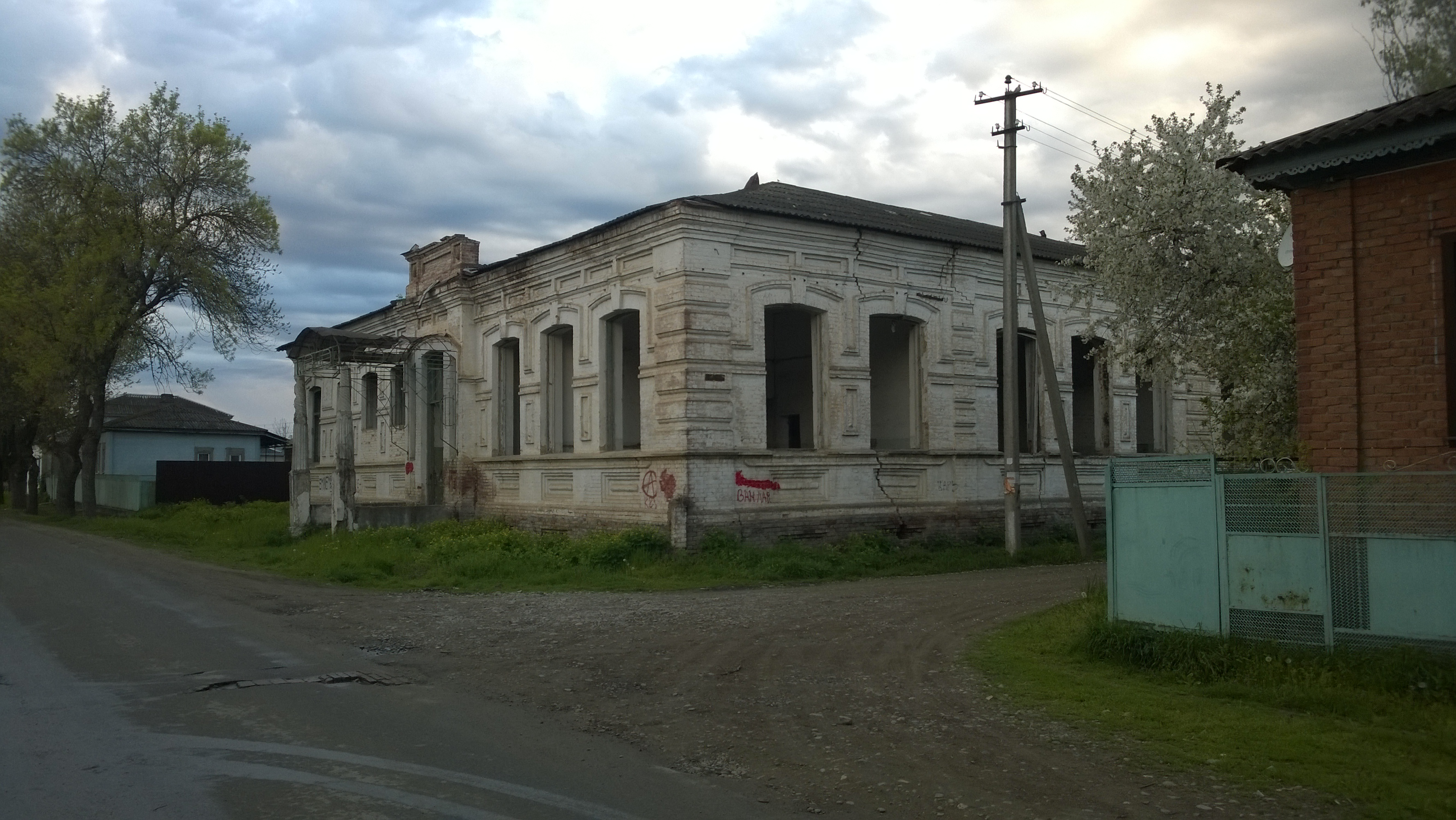 ул. Комсомольская 173